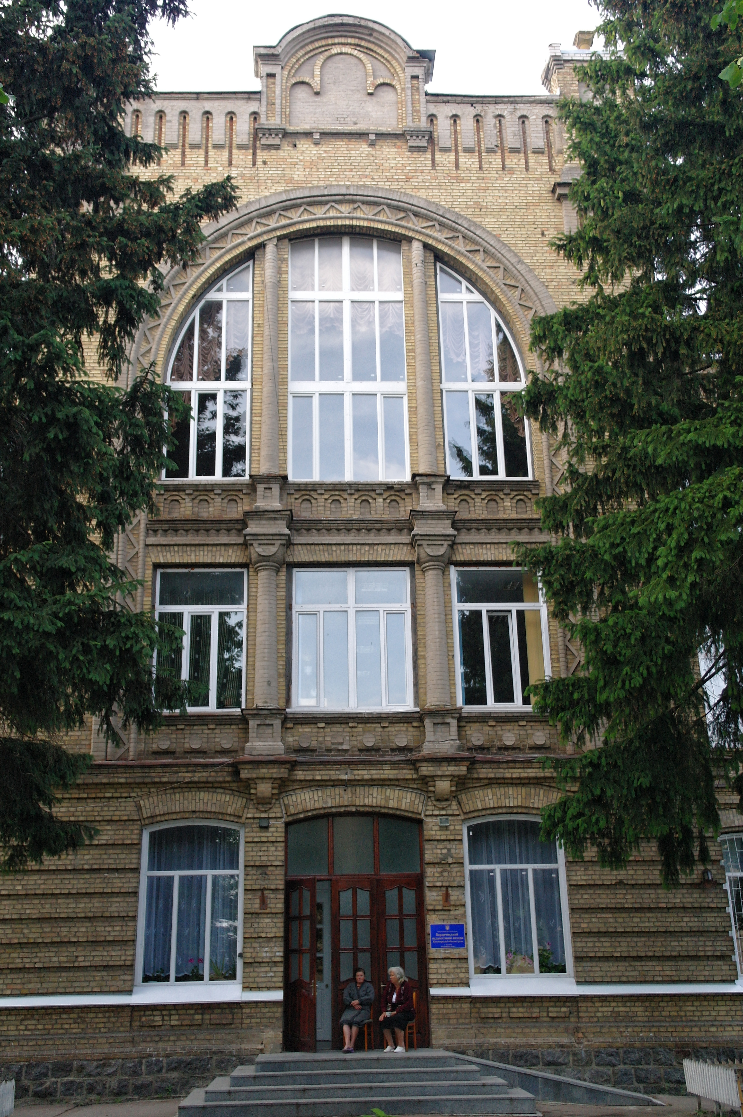 Бердичів, вул.К.Лібкнехта, 53/1, колишнє комерційне училище